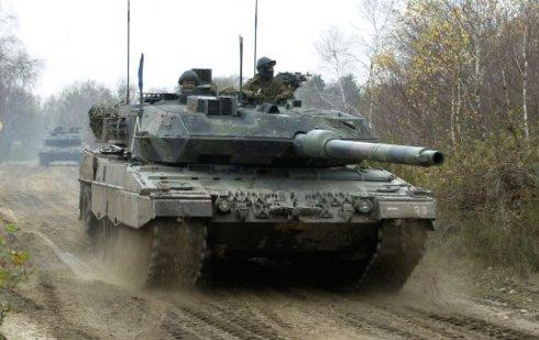 Holland Leopard 2A6, inmiddels uitgefaseerd.